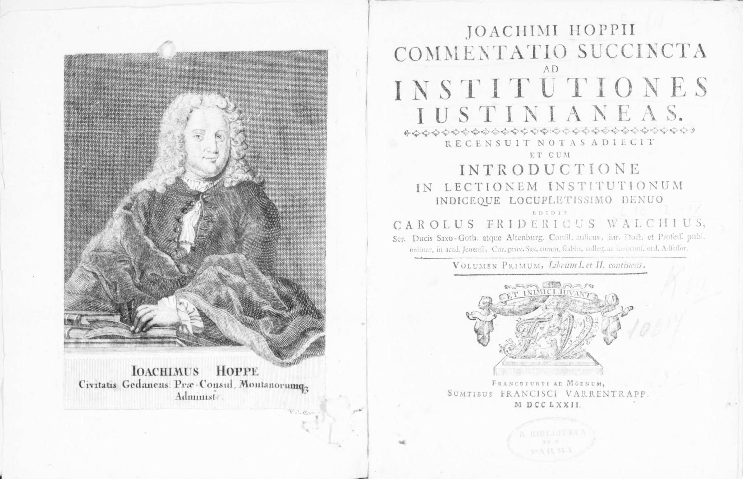 Frontespizio